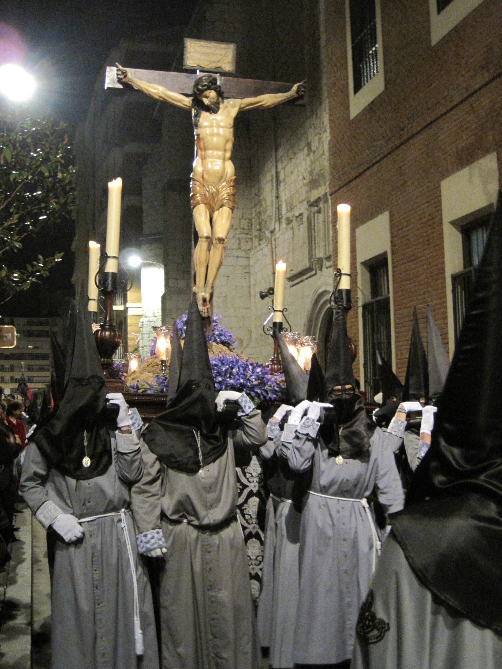 Santo Cristo de las Cinco Llagas. Cofradía Penitencial de la Sagrada Pasión de Cristo, Valladolid (España).